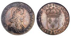 Photo de ma collection personnelle